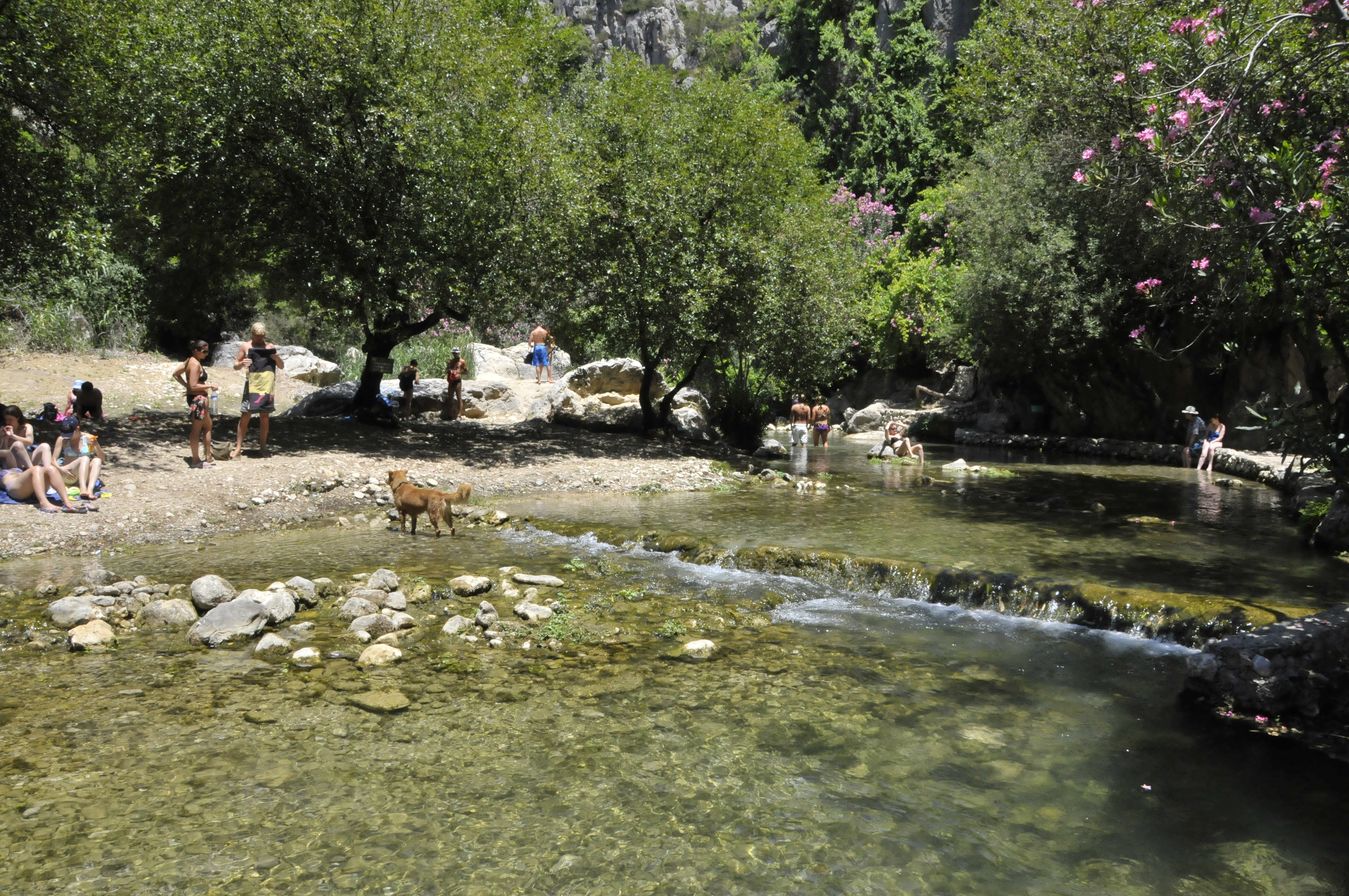 Fuentes del Algar, Spanien, Provinz Alicante, Badende unterhalb des Quellgebietes